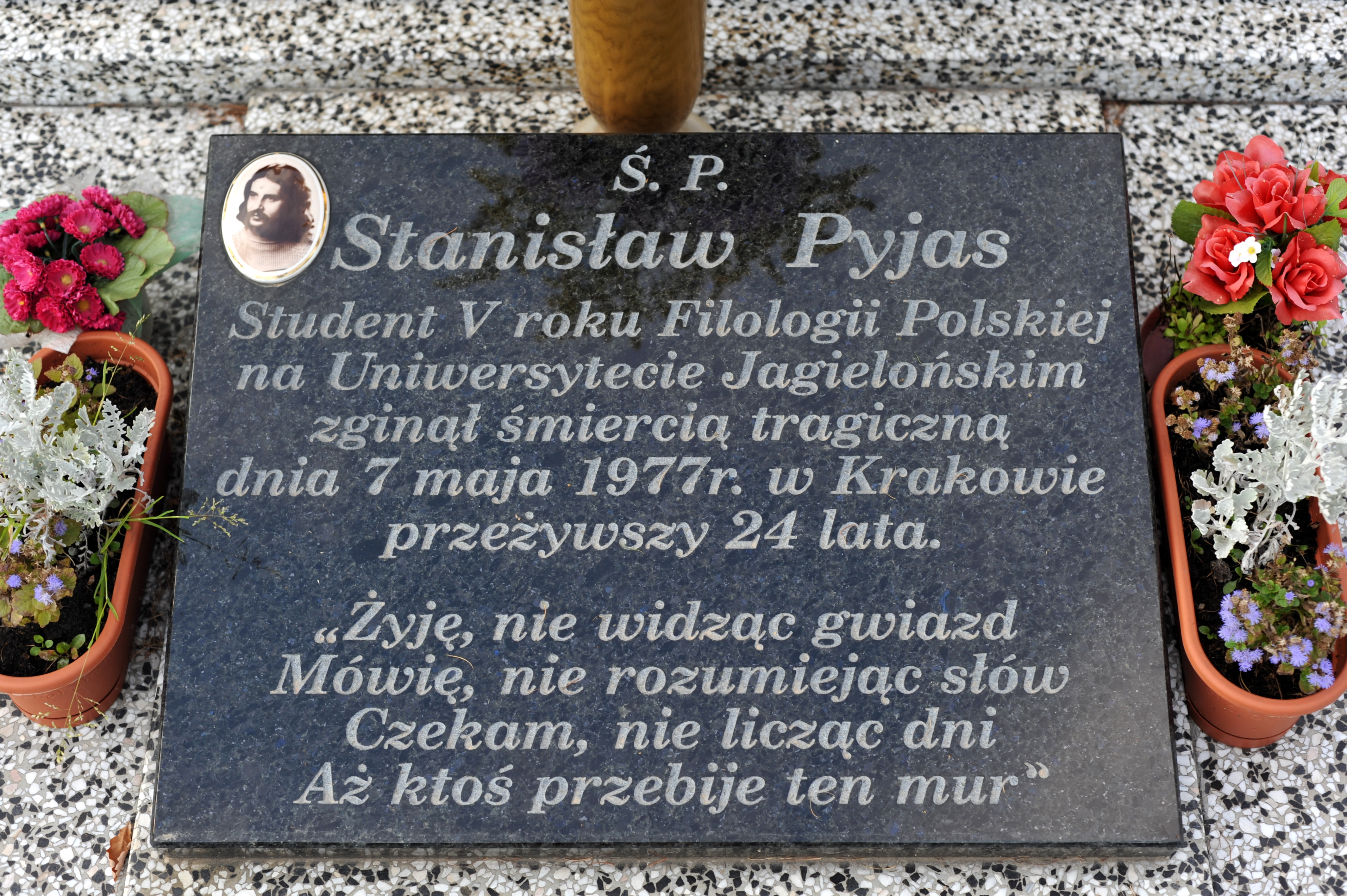 Fragment płyty na grobie Stanisława Pyjasa na cmentarzu w Gilowicach